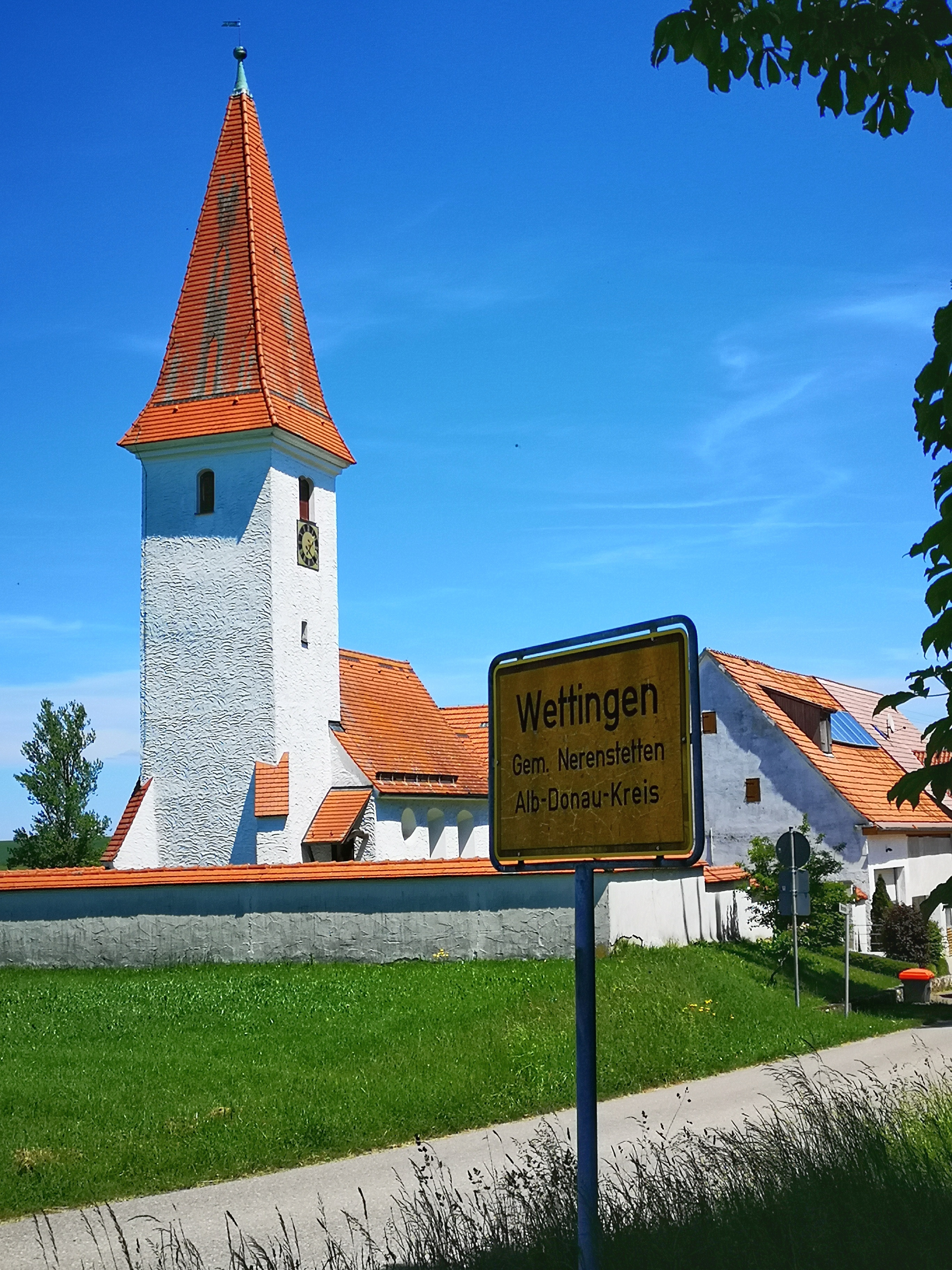 Di evangelisch Chile vo Wettingen